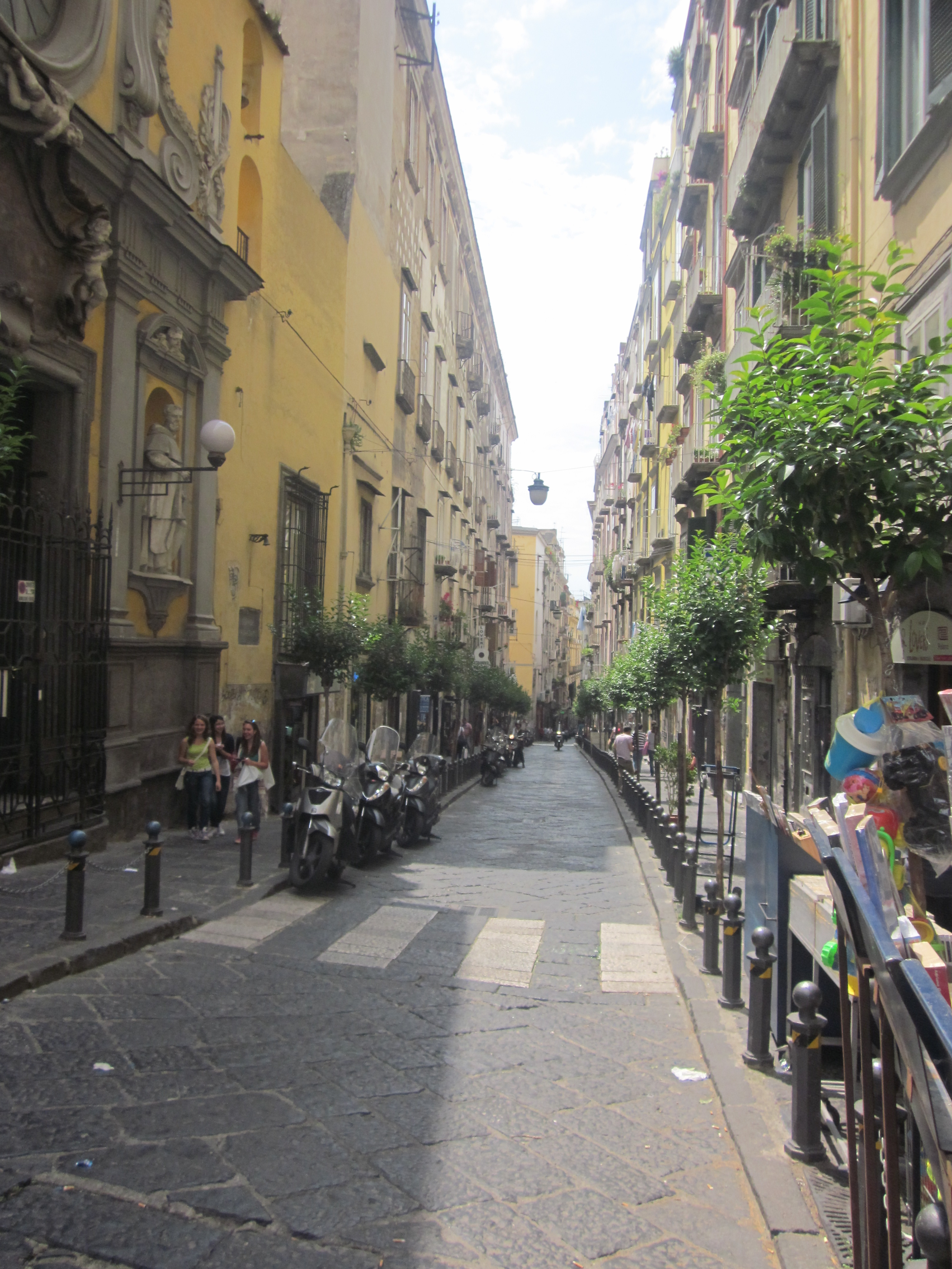 ナポリ、セバスチァーノ通り